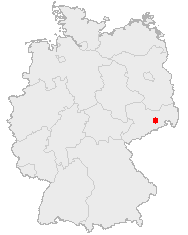 Karte mit der Lage von Dresden in Deutschland